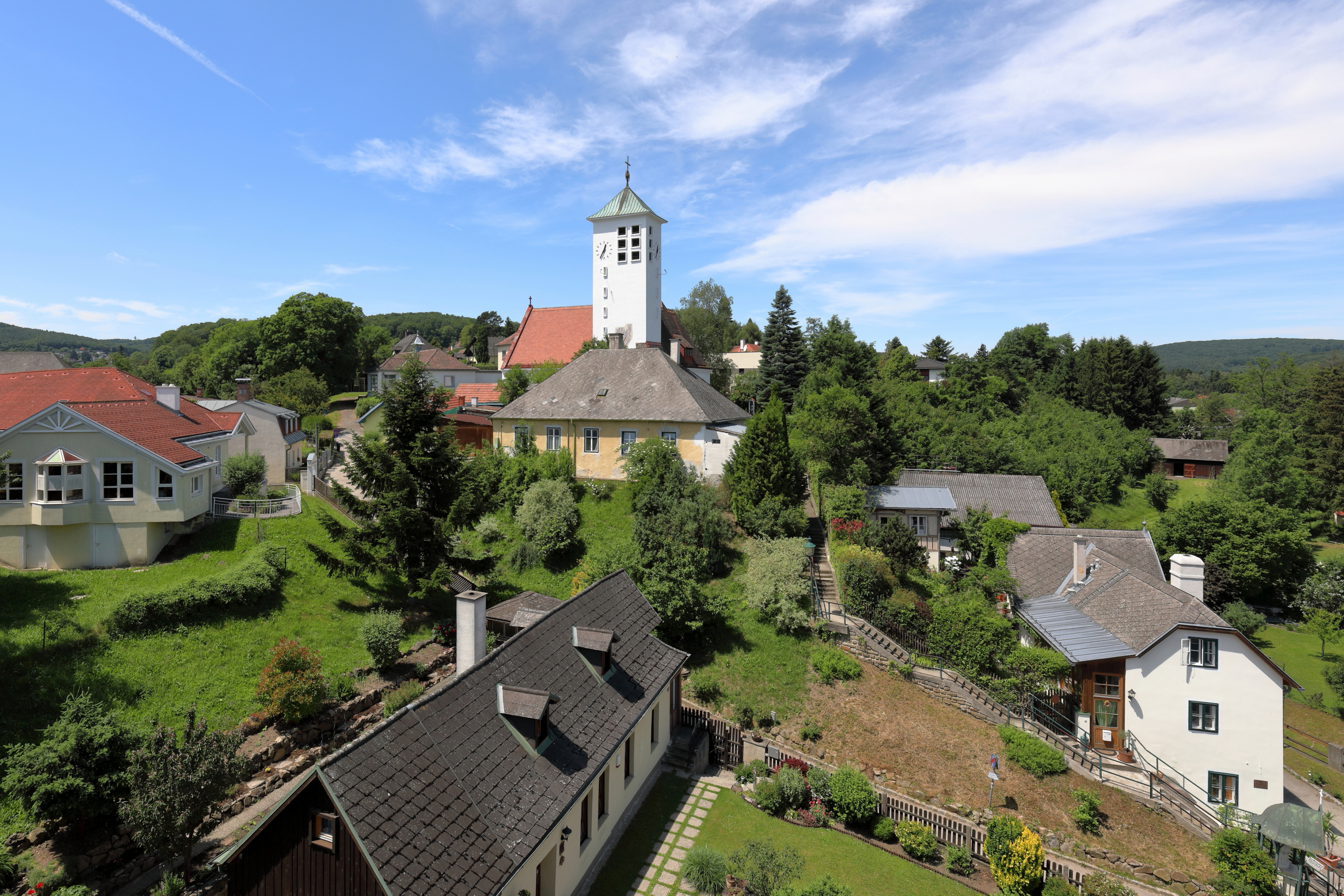 Blick auf die in erhöhter Lage errichteten röm.-kath. Pfarrkirche hl. Lorenz in der niederösterreichischen Marktgemeinde Gablitz. Davor das 1821 errichtete alte Schulhaus (1894 aufgelassen) und rechts unten eine ehemalige Mühle, die unter Denkmalschutz steht, sowie eine Nepomukstatue aus dem Jahr 1724 mit Kupferdach und Bildmitte links der 1999 eröffnete Kindergarten II.